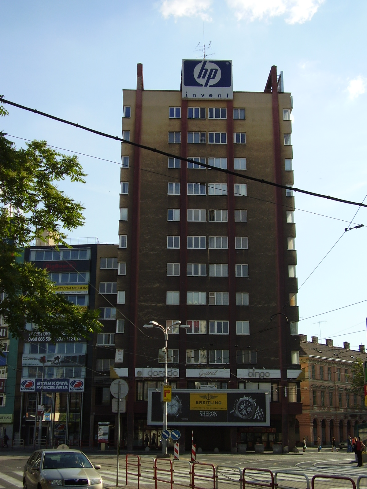 Manderlák, výšková budova v Bratislavě na Kamenném náměstí